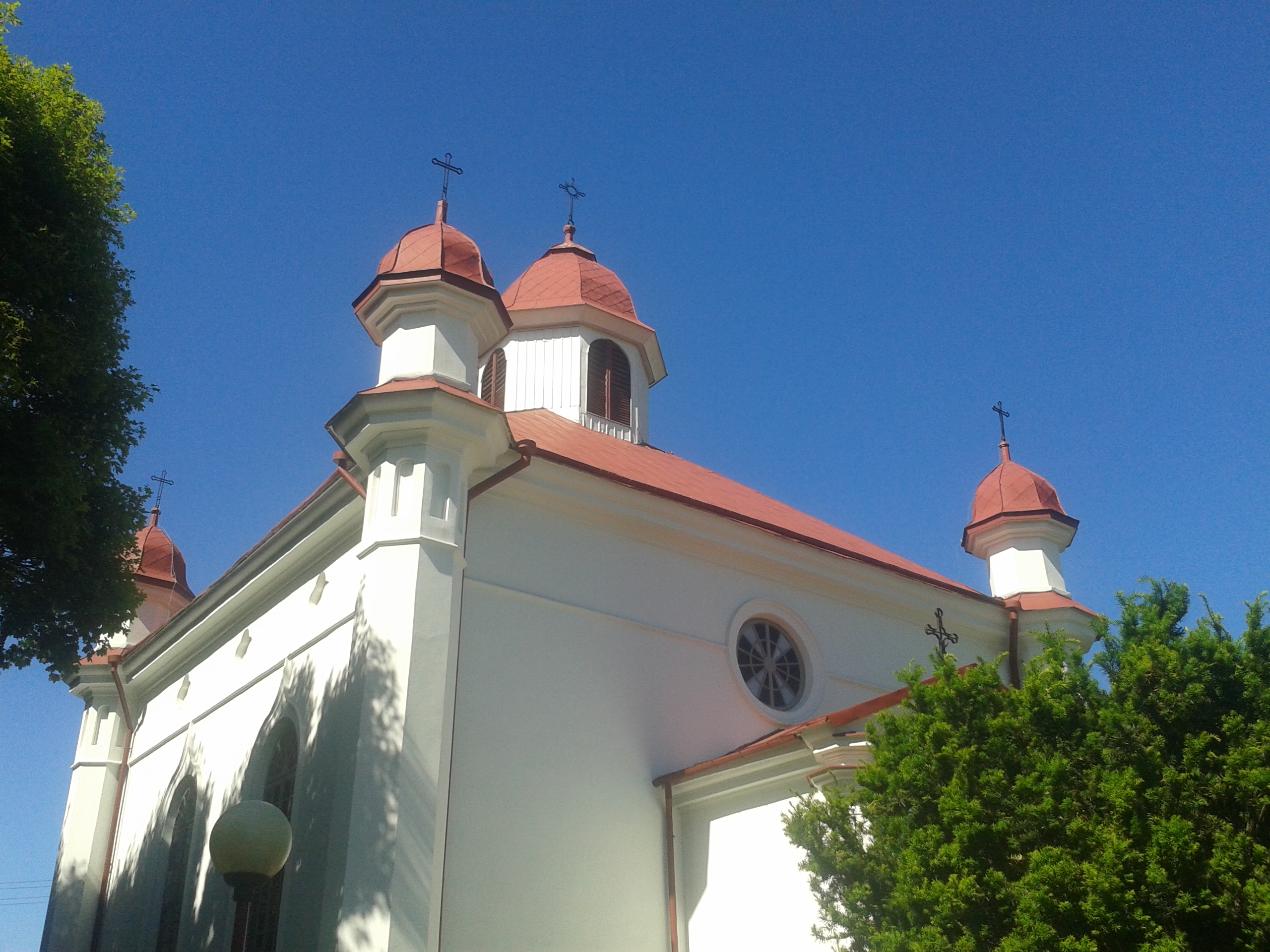 Dawna cerkiew w Klonownicy Dużej